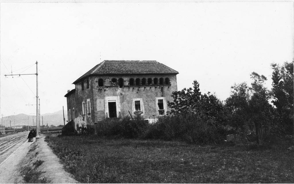 Vista general de la Torre del Fang i carretera. Juli Vintró i Casallachs (Entre 1890 i 1911)